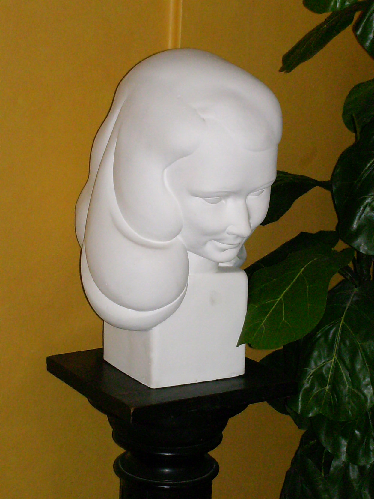 La Bonté, Mau Xhrouet, ca. 1950, plâtre